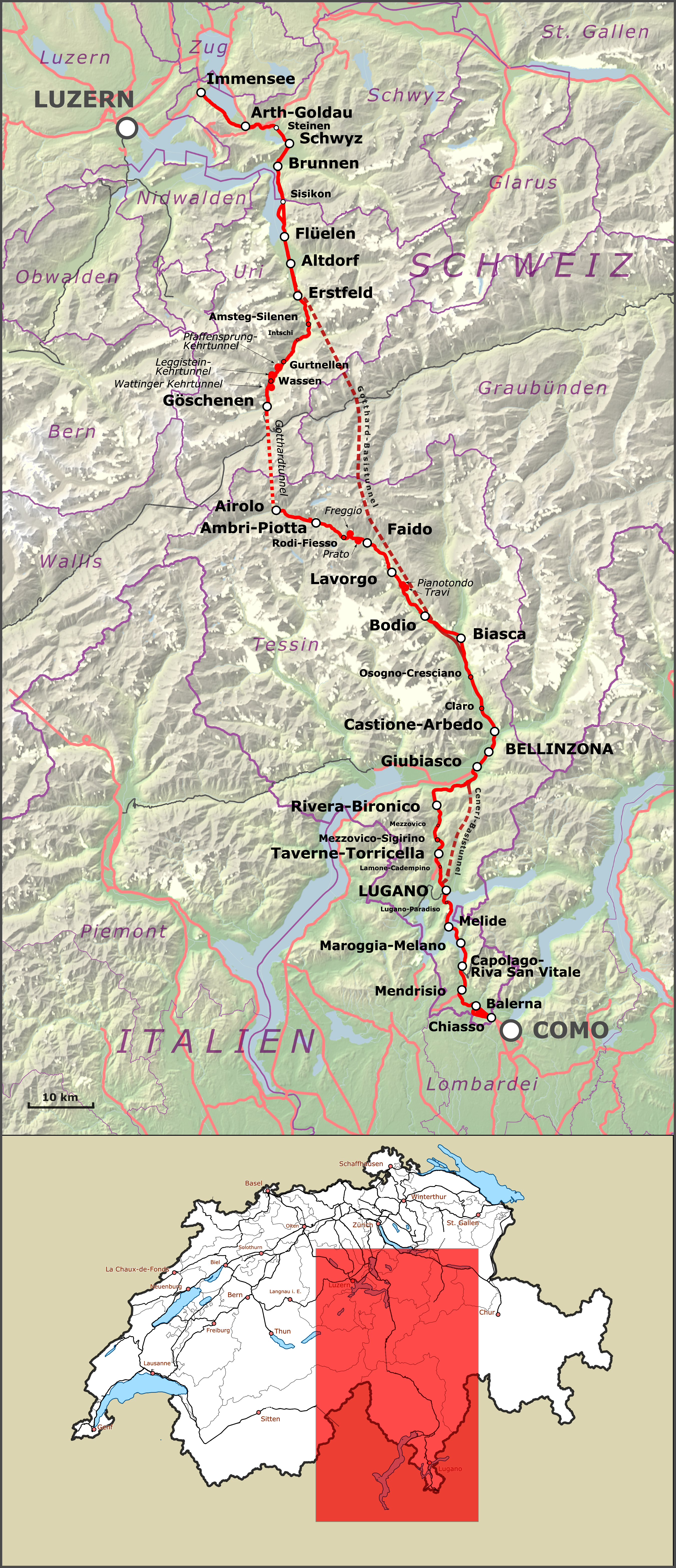 Karte der Gotthardbahn in der Schweiz